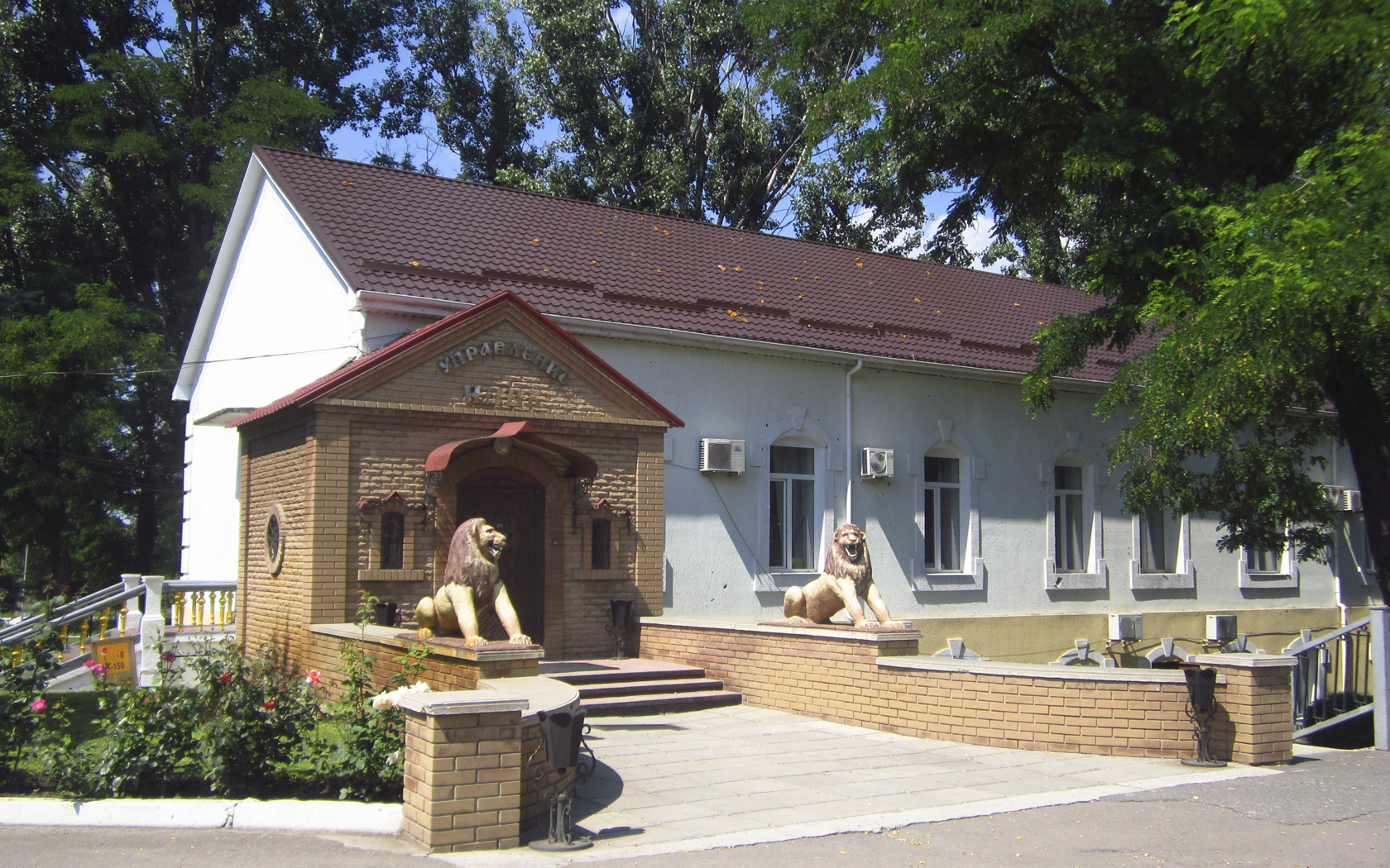 Заводоуправление Лутугинского НПВК